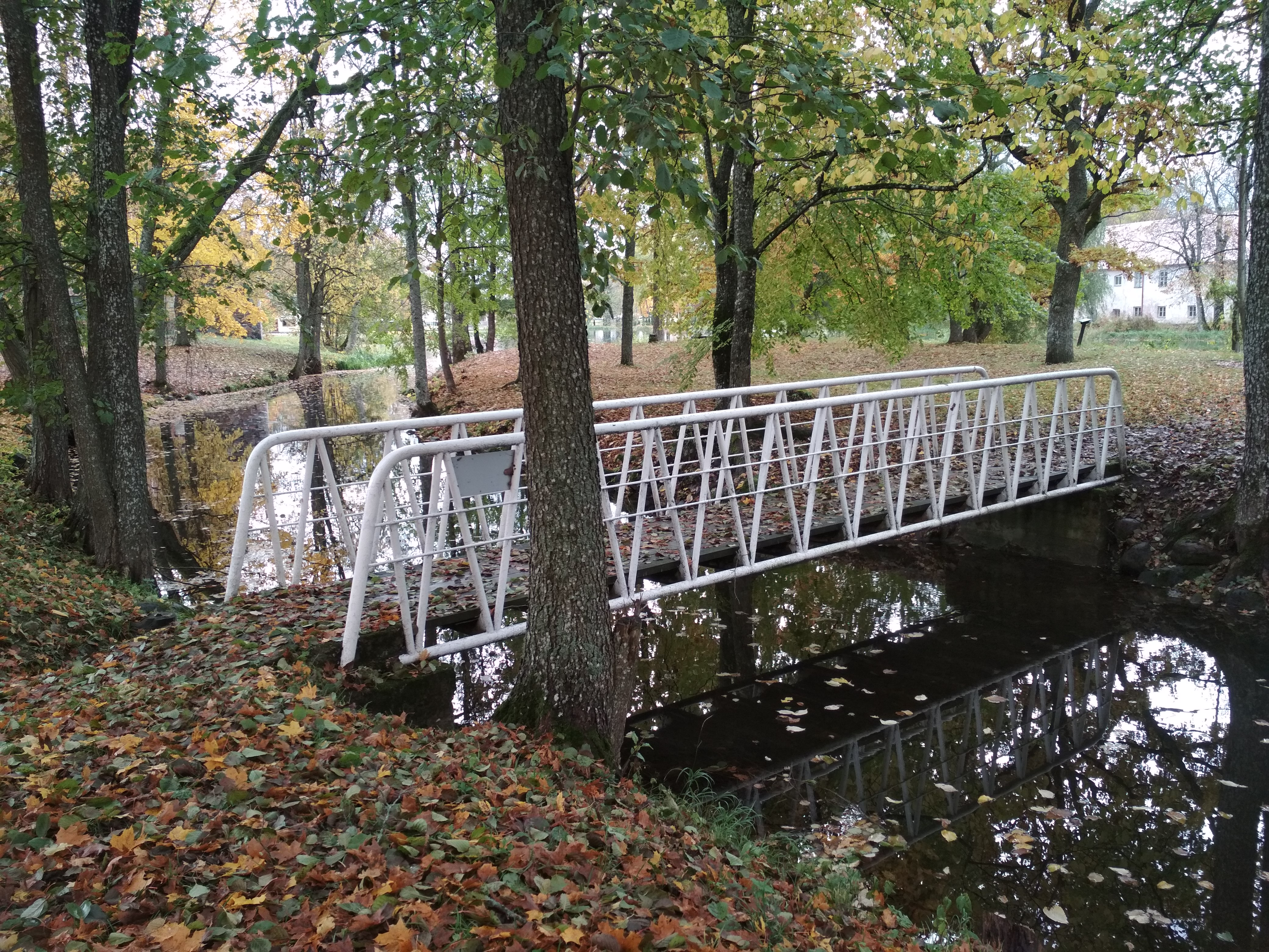 Sild Põltsamaa jõe Naissaarikule (Põtsamaa linnas)